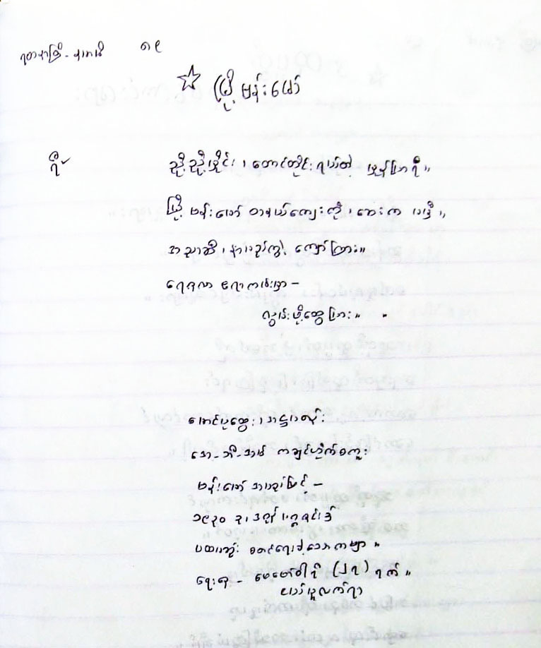 မြန်မာဘာသာ: ပထမဆုံး ကဗျာ